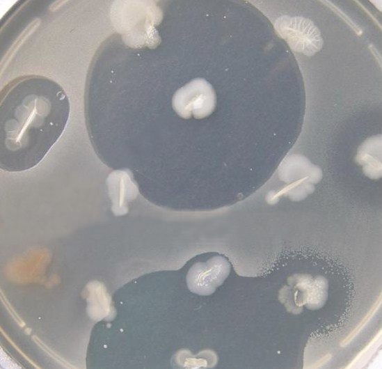 Escherichia coli produkujúca kolicín Ia a mikrocín V